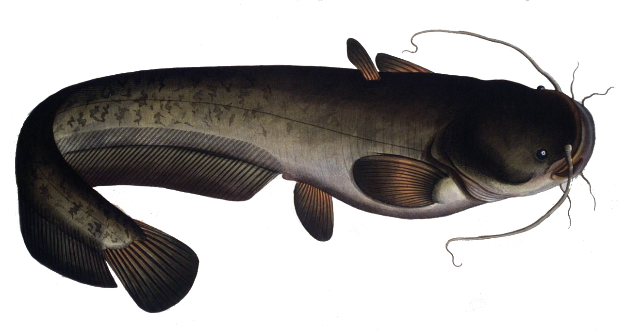 Silurus glanis